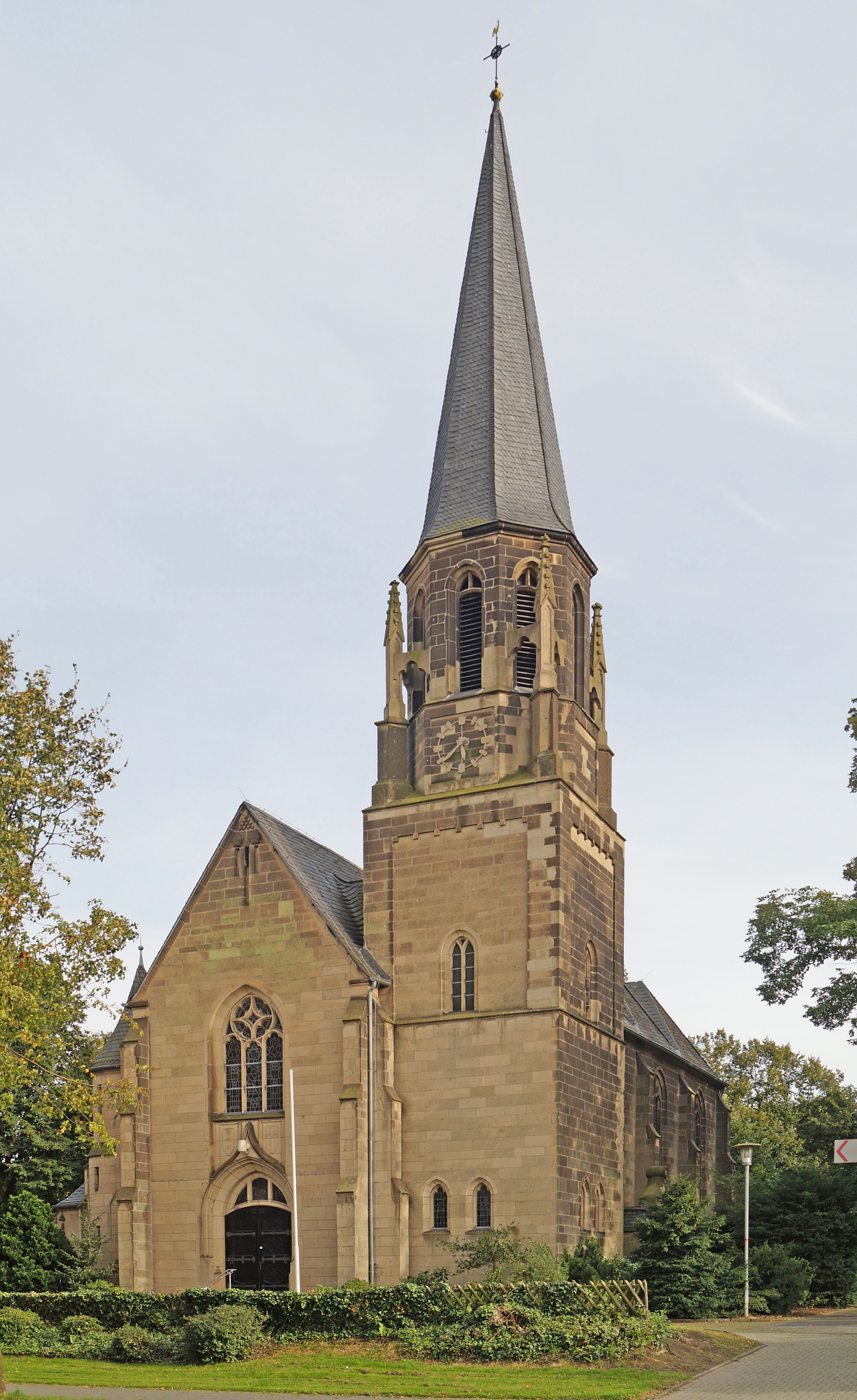 St. Georg Liedberg Straßenansicht